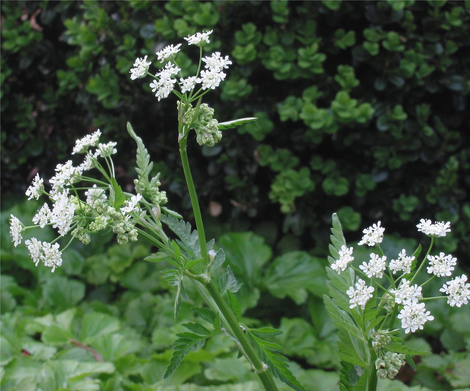 Anthriscus sylvestris flowers (Fluitenkruidbloemen)